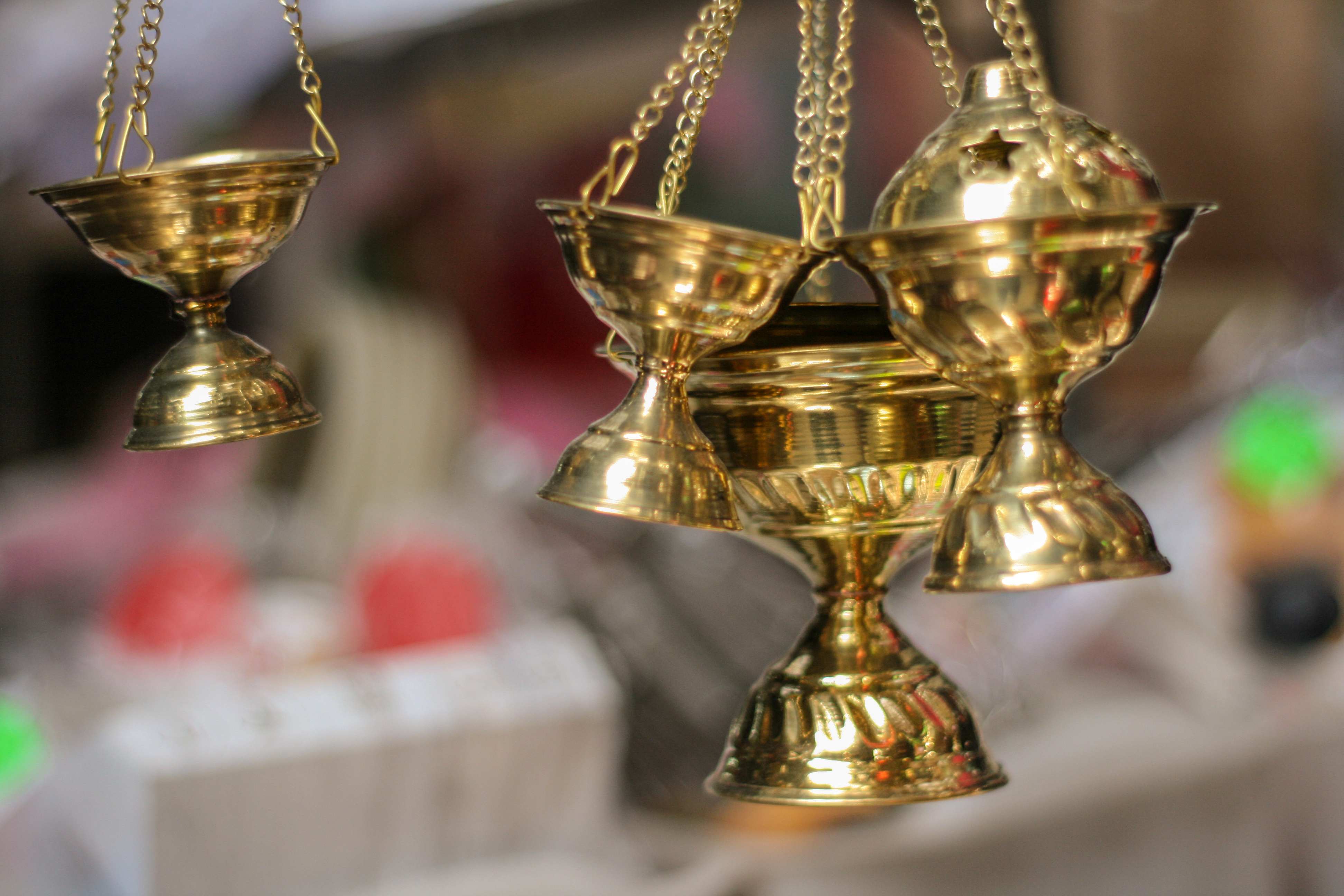 צילום של פמוטים מזהב בשוק נצרת.